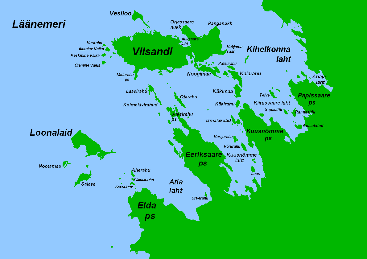 Vilsandi ja lähiümbruse saared